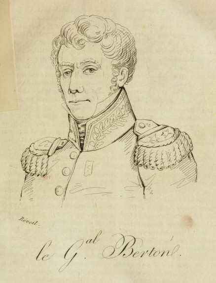 Portrait du général Jean-Baptiste Berton (1774-1822) , tel qu'il apparaît dans : Jacques-Alphonse Mahul, Annuaire nécrologique, ou Supplément annuel et continuation de toutes les biographies ou dictionnaires historiques, 3e année, 1822, Paris : Ponthieu, 1823, entre les pages 20 & 21.